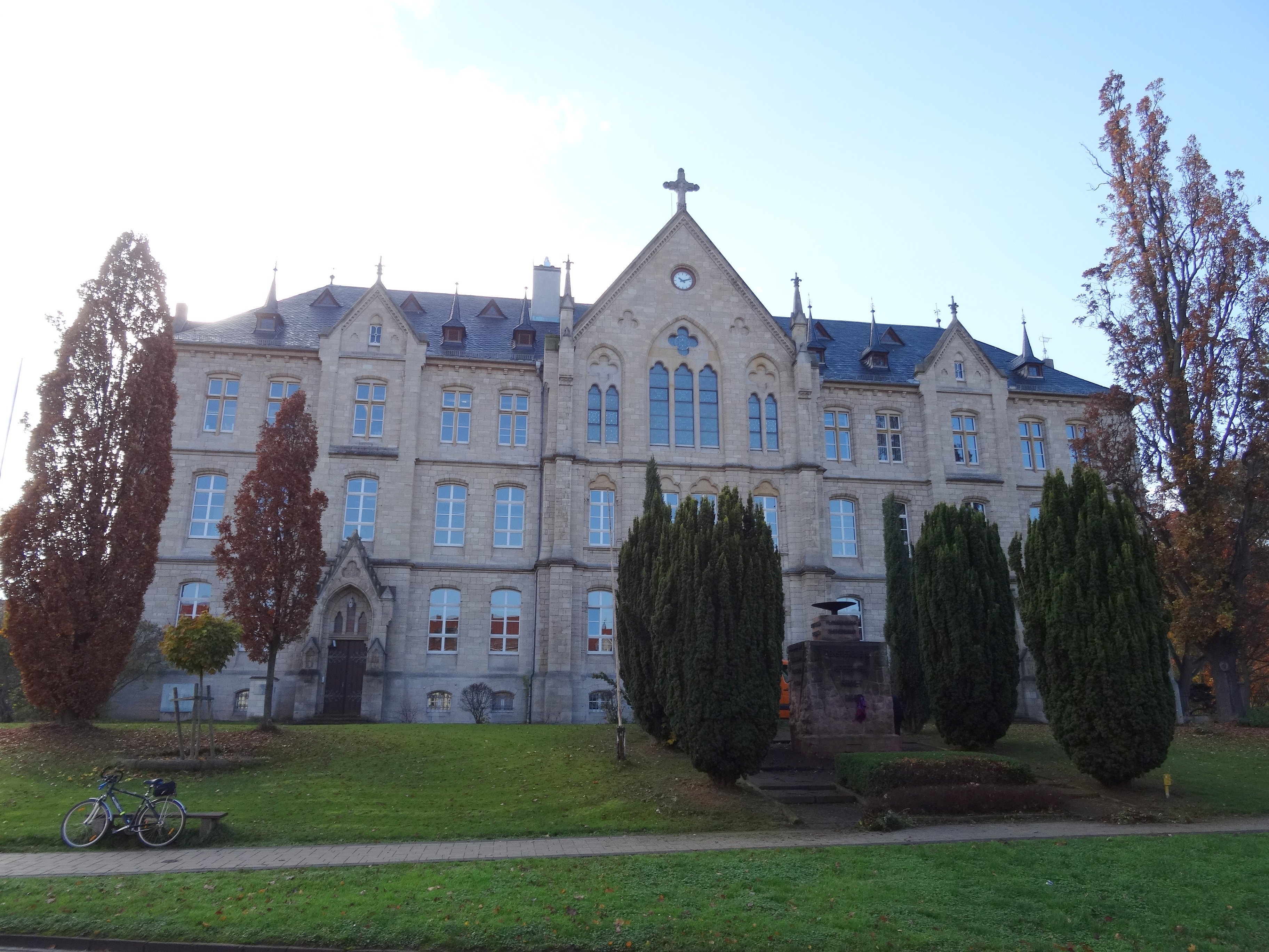 ehem. Fürstliches Gymnasium zu Sondershausen mit neogotischer Fassade von 1881, entworfen von Architekt Carl Frühling